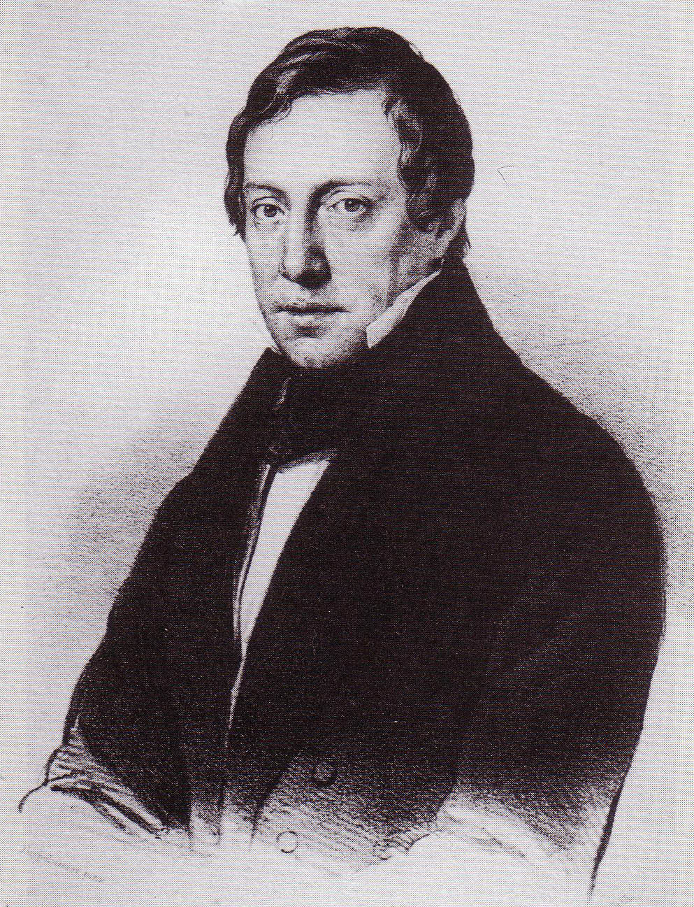 Joseph Freiherr von Spaun (1788-1865, Austria